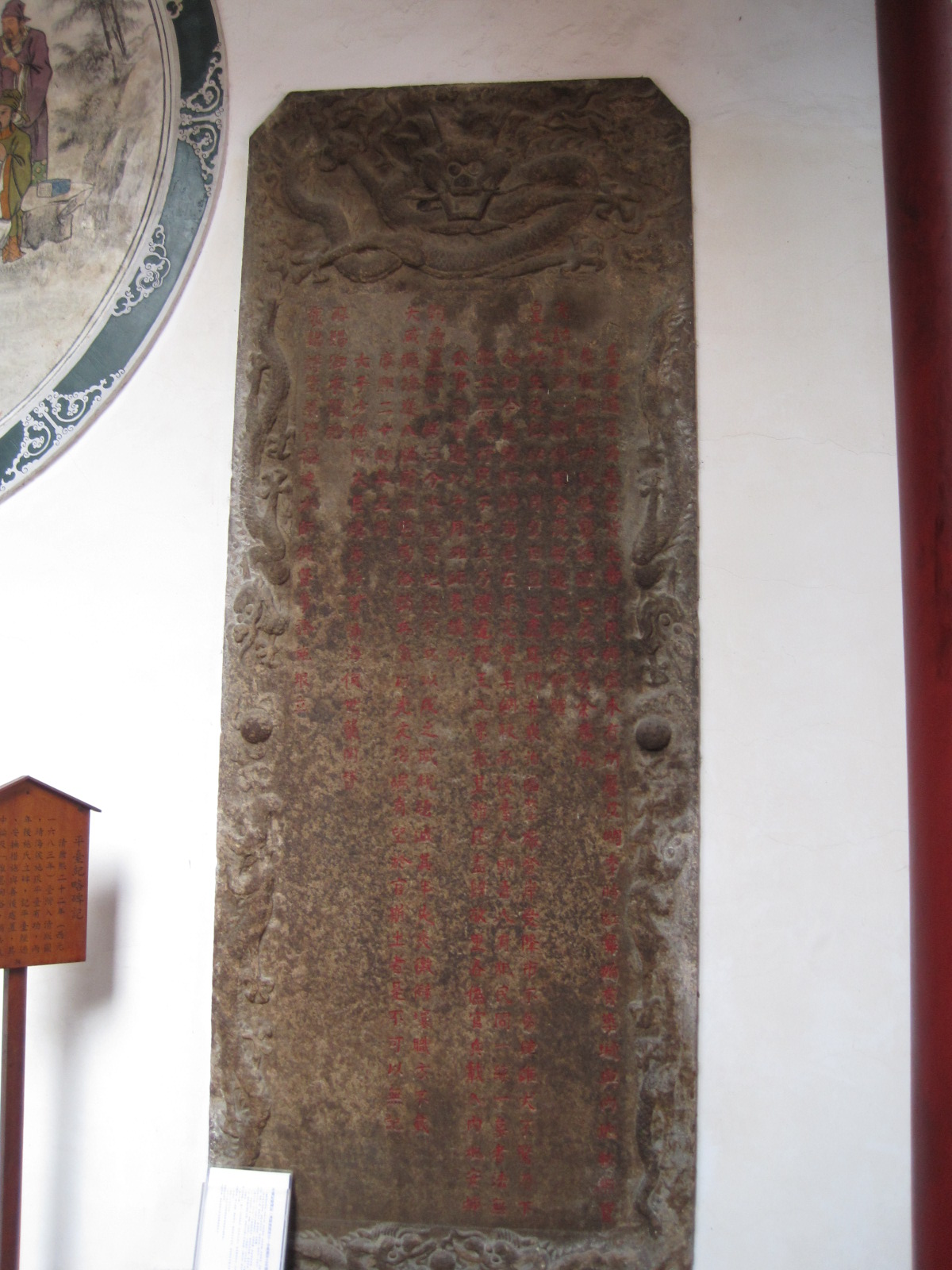 施琅平臺紀略碑記石碑